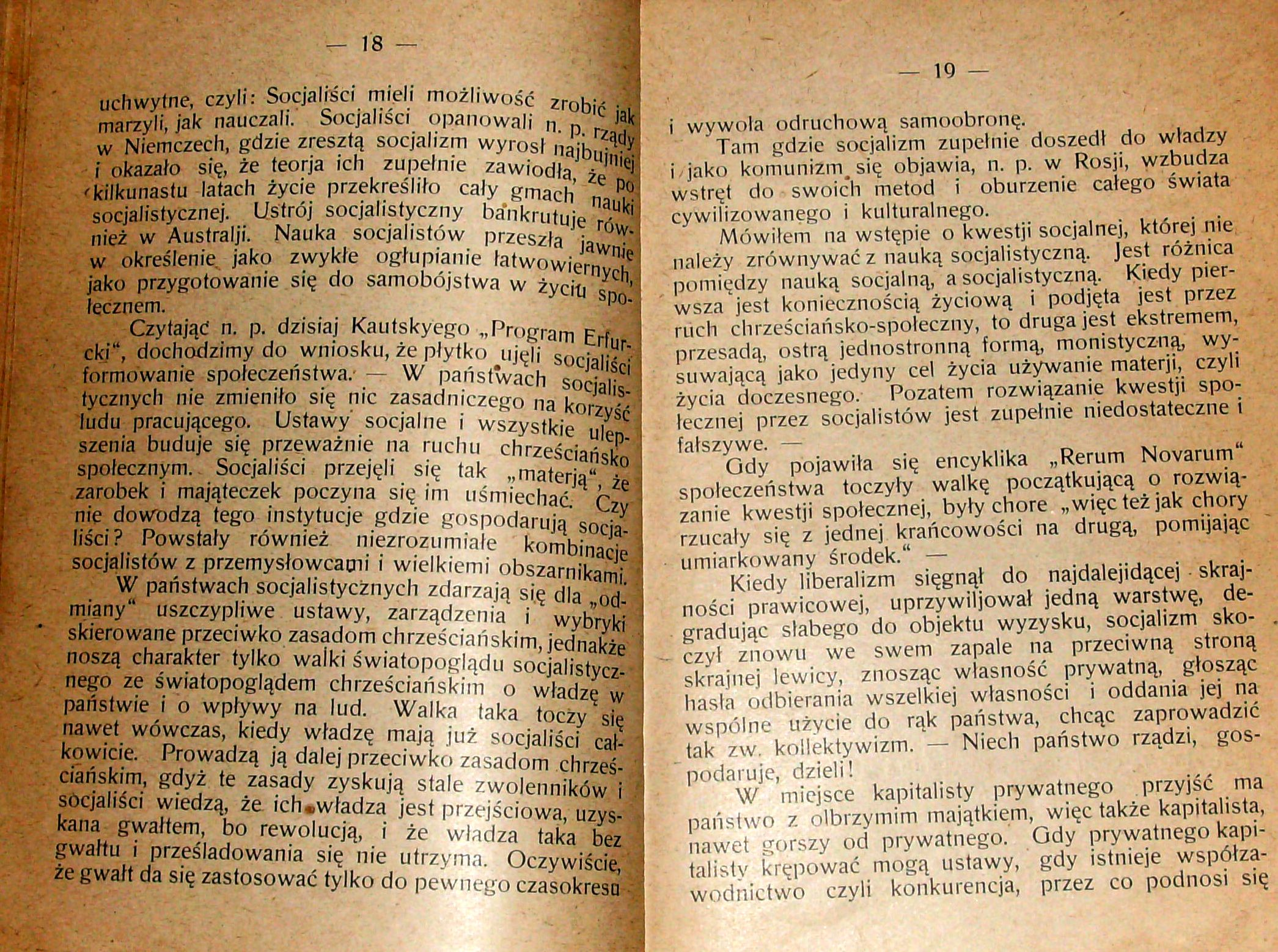 Stanisław Krzyżowski, Rozmyślania w czterdziestą rocznicę encykliki „Rerum novarum”, wydanej 15 maja 1891 r. przez papieża Leona XIII, Pszczyna 1931